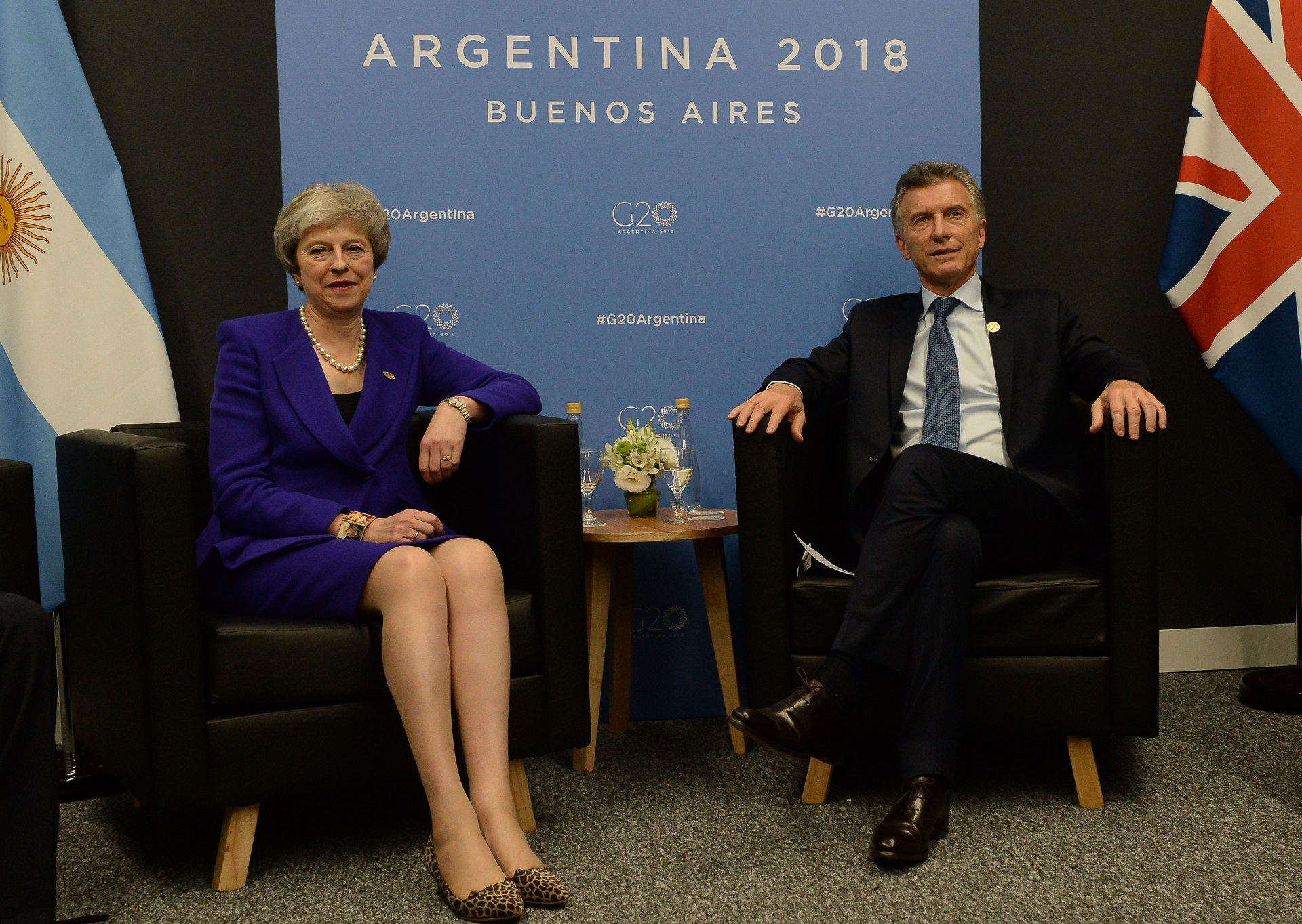 El presidente Mauricio Macri y la primera ministra del Reino Unido, Theresa May, mantuvieron una reunión bilateral en el centro Costa Salguero, sede de la Cumbre de Líderes del G20, que se desarrolla en Buenos Aires. No se habló de la cuestión de soberanía de las islas Malvinas.